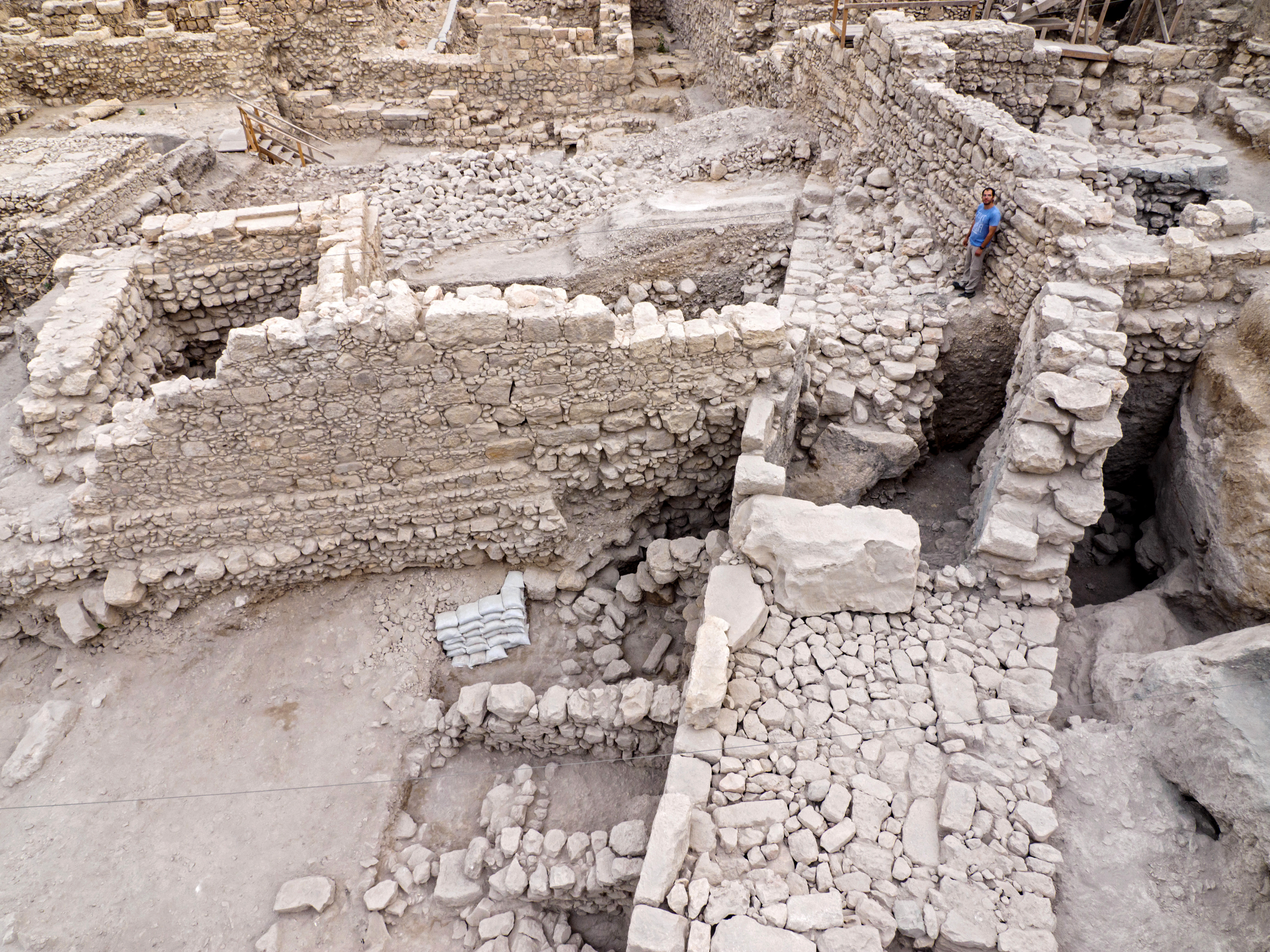 שרידי מצודת החקרא כפי שזוהו באתר הארכאולוגי חניון גבעתי בירושלים